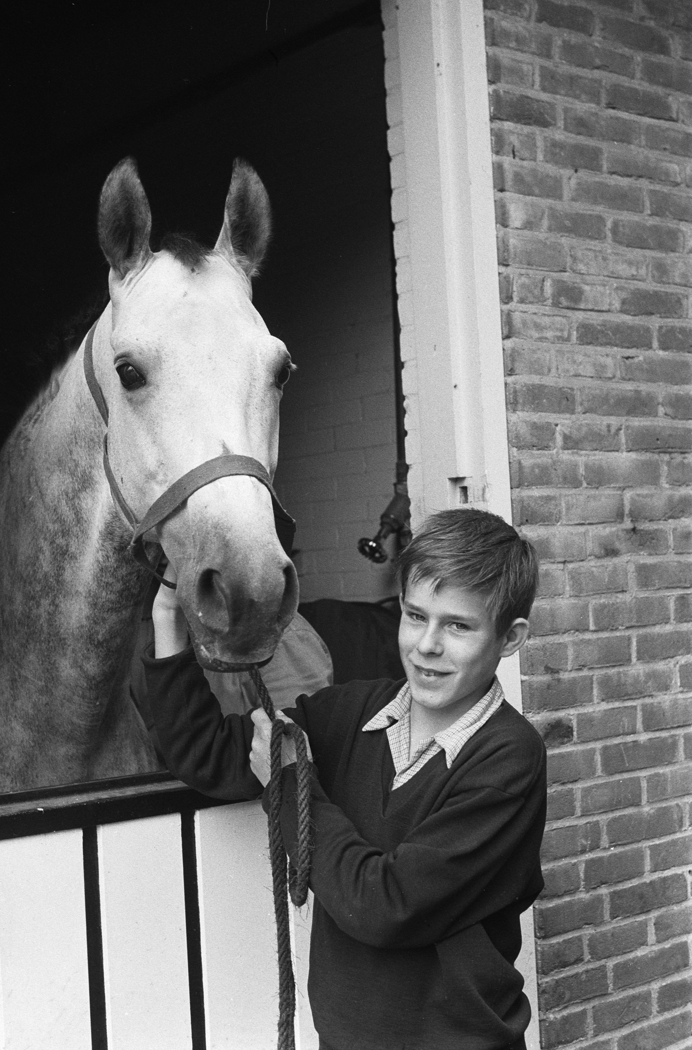 Collectie / Archief : Fotocollectie Anefo Reportage / Serie : [ onbekend ] Beschrijving : 14-jarige Reitze van der Linden in film van Fons Rademakers [film "Het Mes"] Datum : 20 juli 1960 Trefwoorden : acteurs, films, filmsterren, jongens, paarden Persoonsnaam : Linden, Reitze van der Fotograaf : Pot, Harry / Anefo Auteursrechthebbende : Nationaal Archief Materiaalsoort : Negatief (zwart/wit) Nummer archiefinventaris : bekijk toegang 2.24.01.05 Bestanddeelnummer : 911-4375